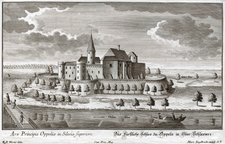 Das Fürstliche Schloss zu Oppeln in Ober-Schlesien